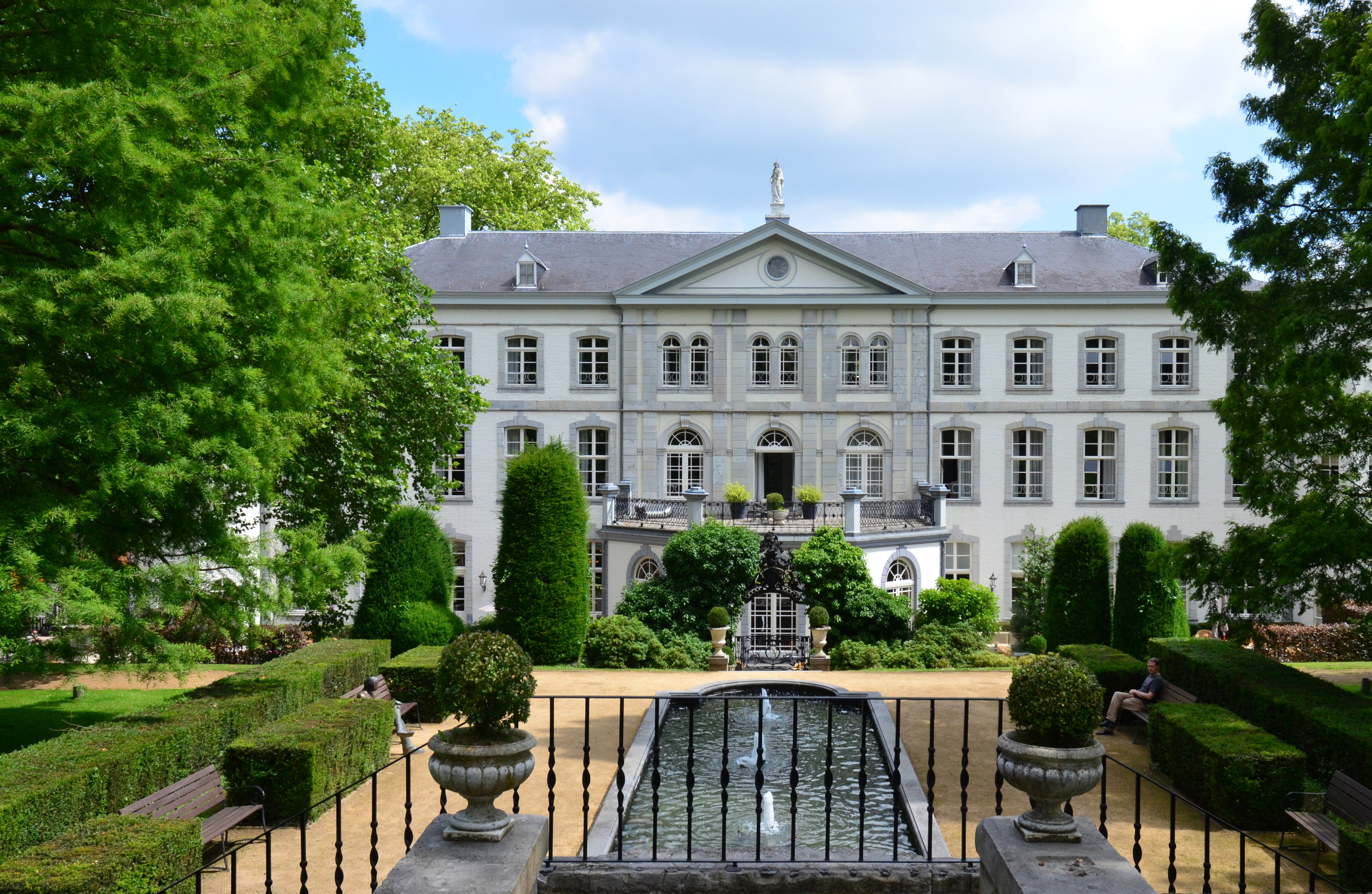 Gartenfassade des Schlosses Bloemendal in Vaals